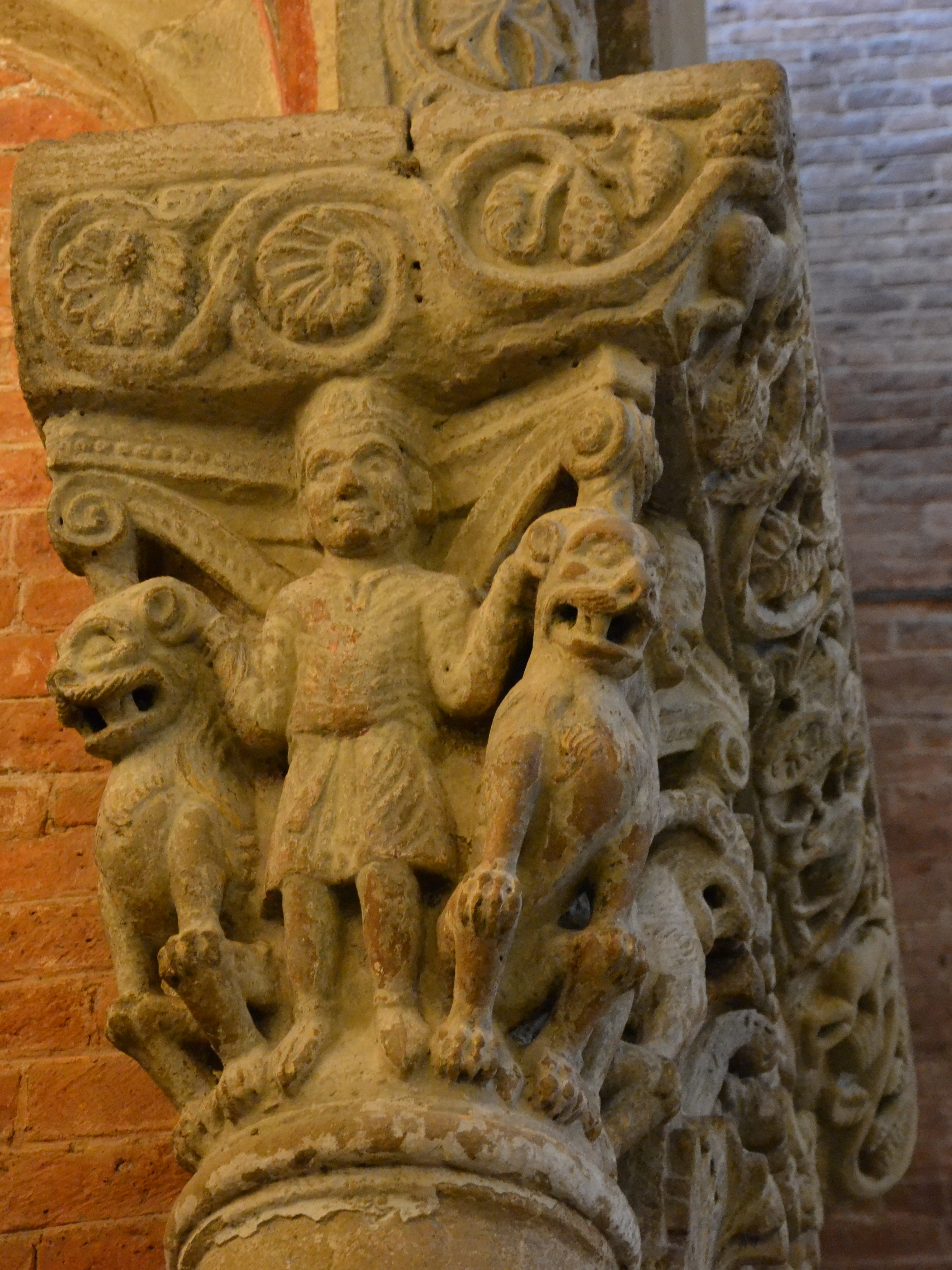 San Michele Maggiore (Pavia)